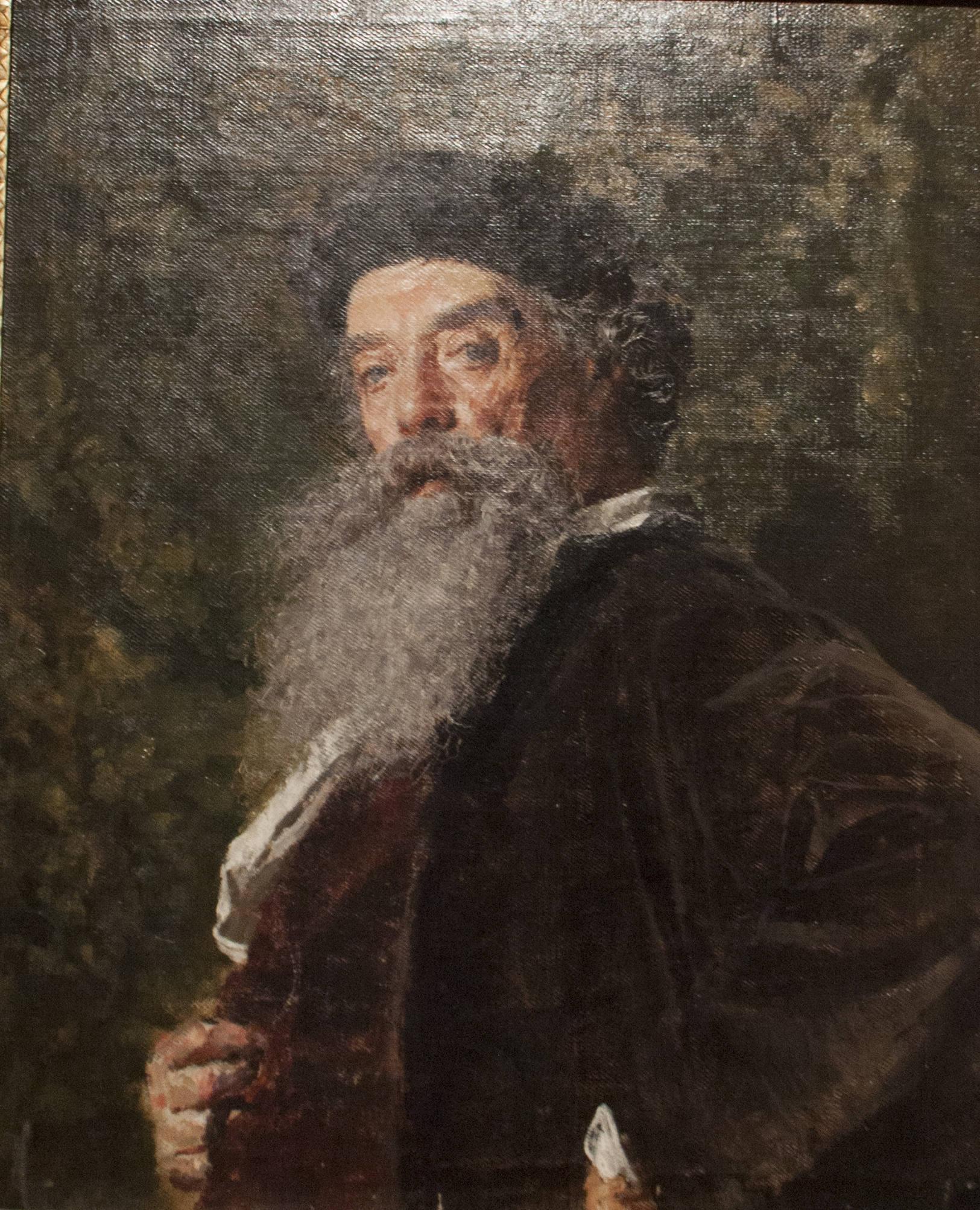 Ritratto del pittore Lo Forte - Paolo Vetri olio su tela 1880 ca